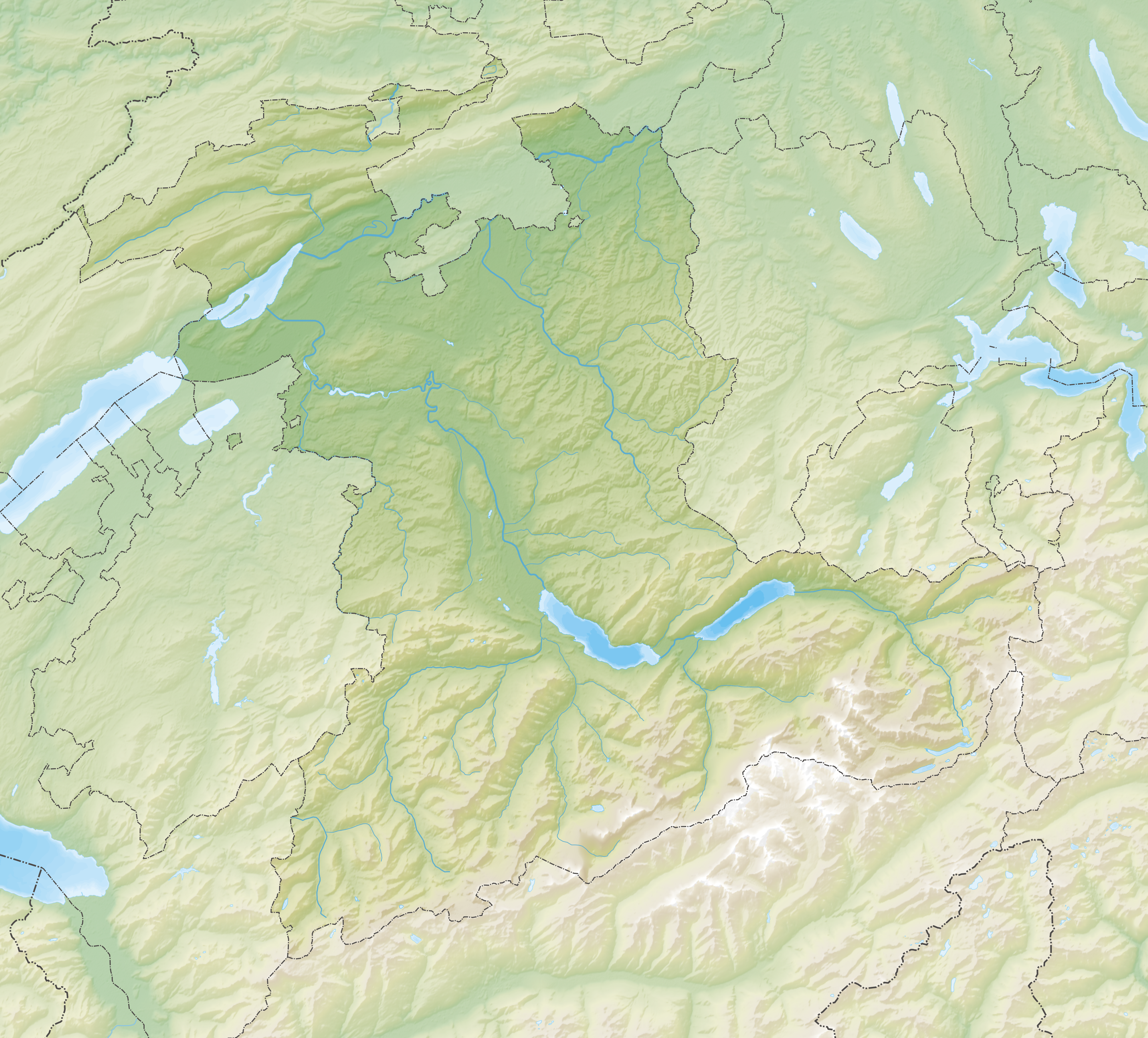 Reliefkarte des Kantons Bern Topographischer Hintergrund: NASA Shuttle Radar Topography Mission (public domain). SRTM3 v.2.